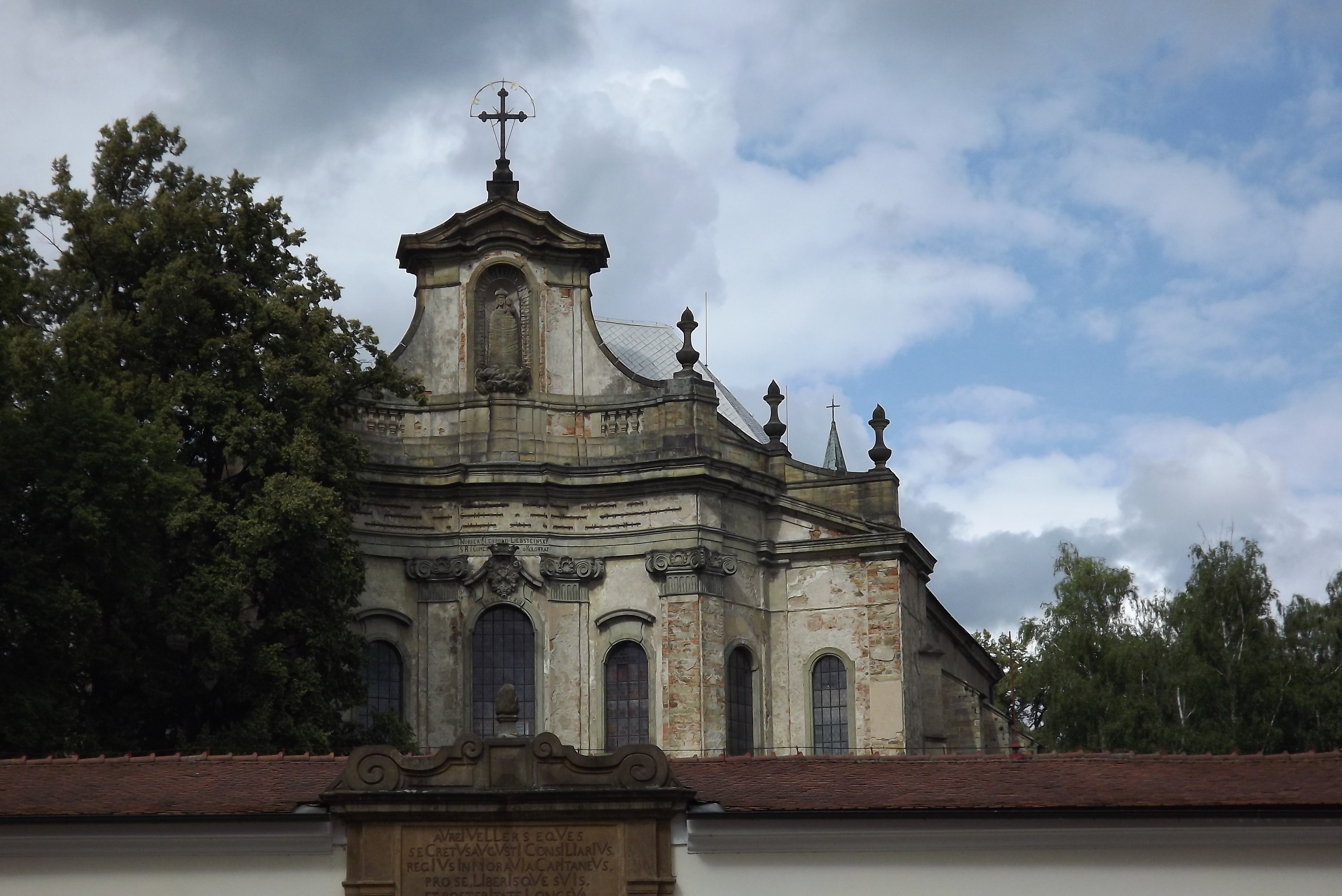 Zámek Rychnov nad Kněžnou, Kolowratská 1, Rychnov nad Kněžnou